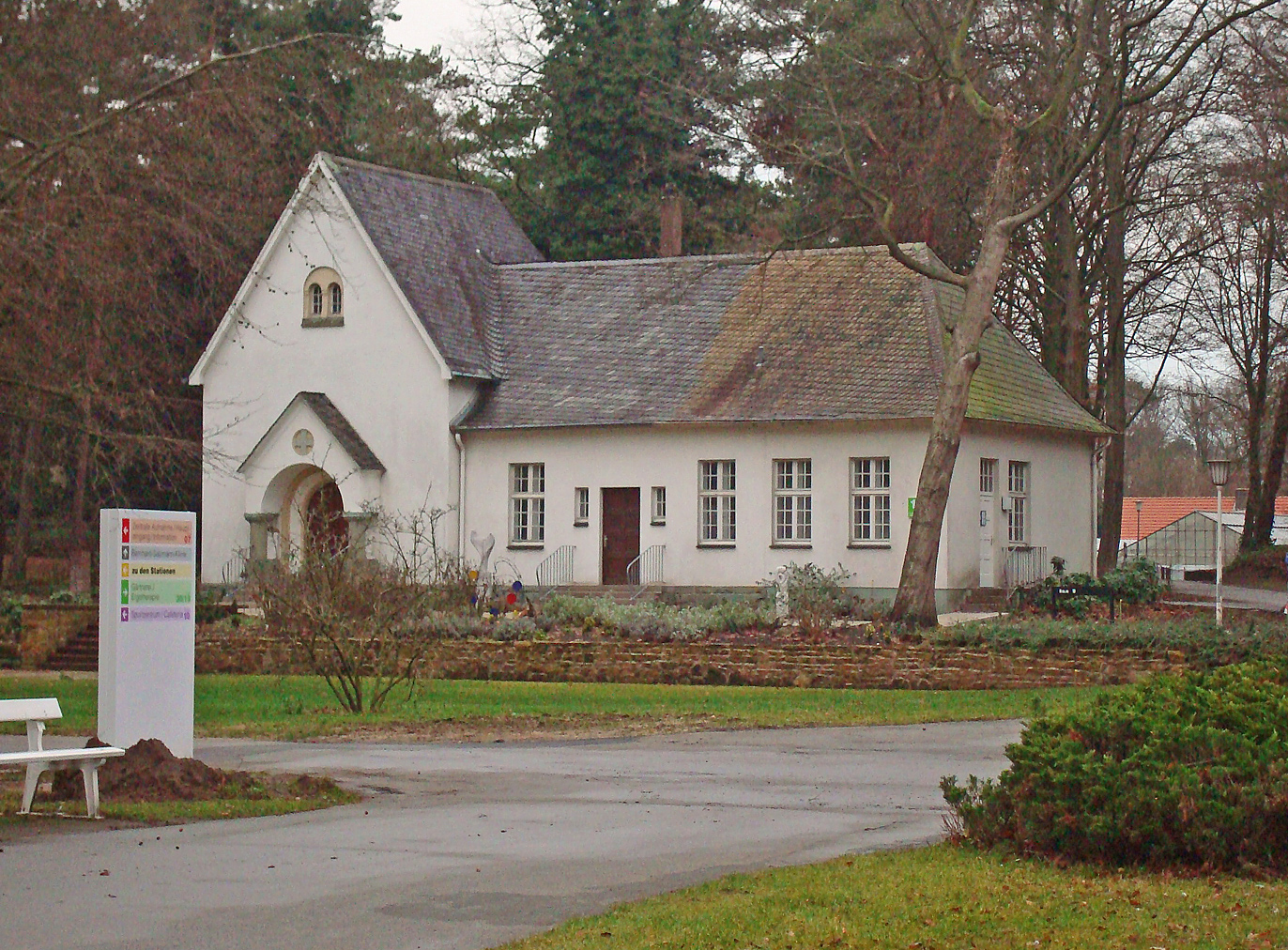 Friedhofskapelle im Park der LWL-Klinik Gütersloh